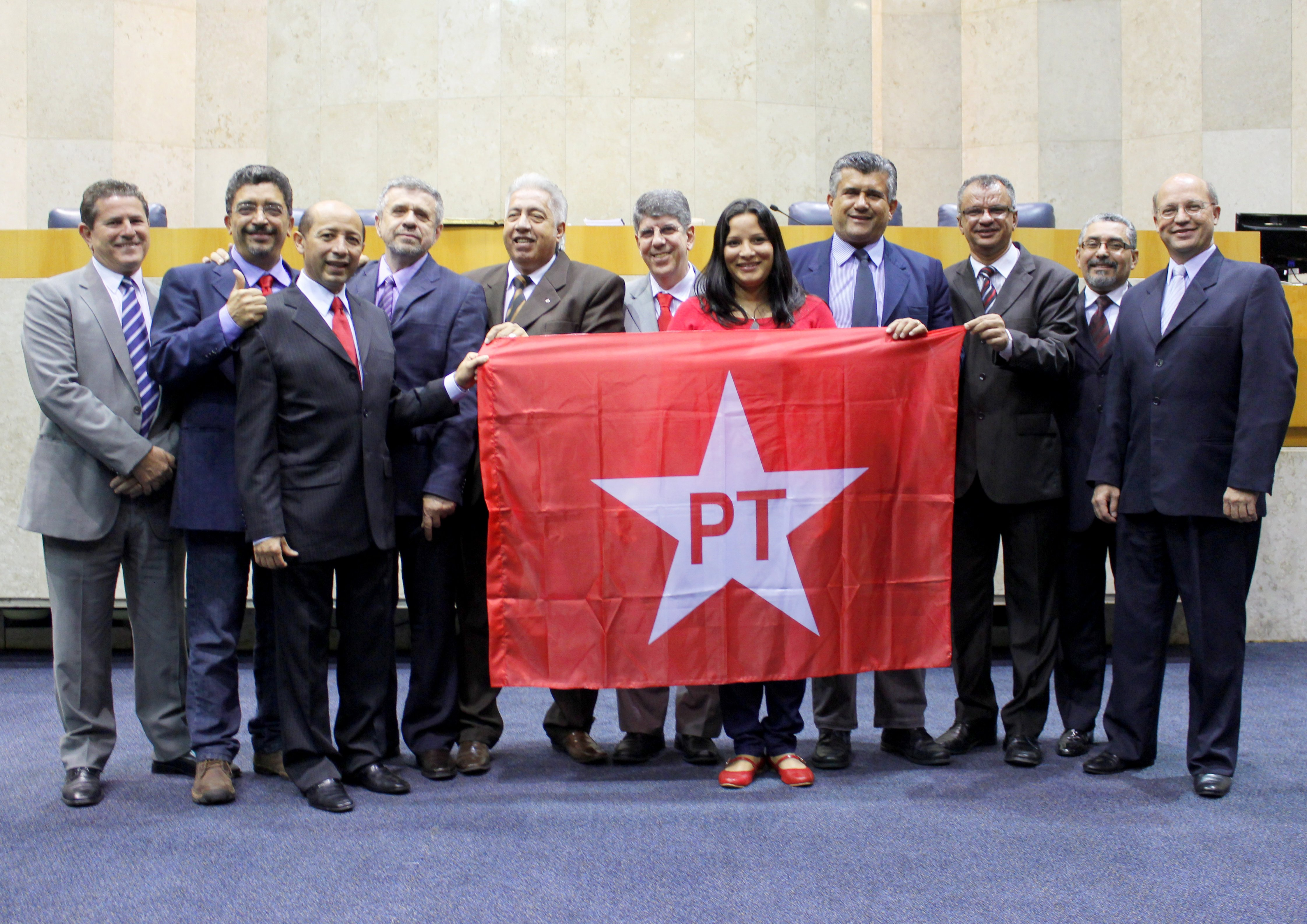 Bancada dos vereadores do PT - Partido dos Trabalhadores na Câmara Municipal de São Paulo em 2012 - Arselino Tatto, Francisco Chagas, Alfredinho, Zé Américo, Zelão, Donato, Juliana, ìtalo, Chico Macena, Senival Moura, e Carlos Neder